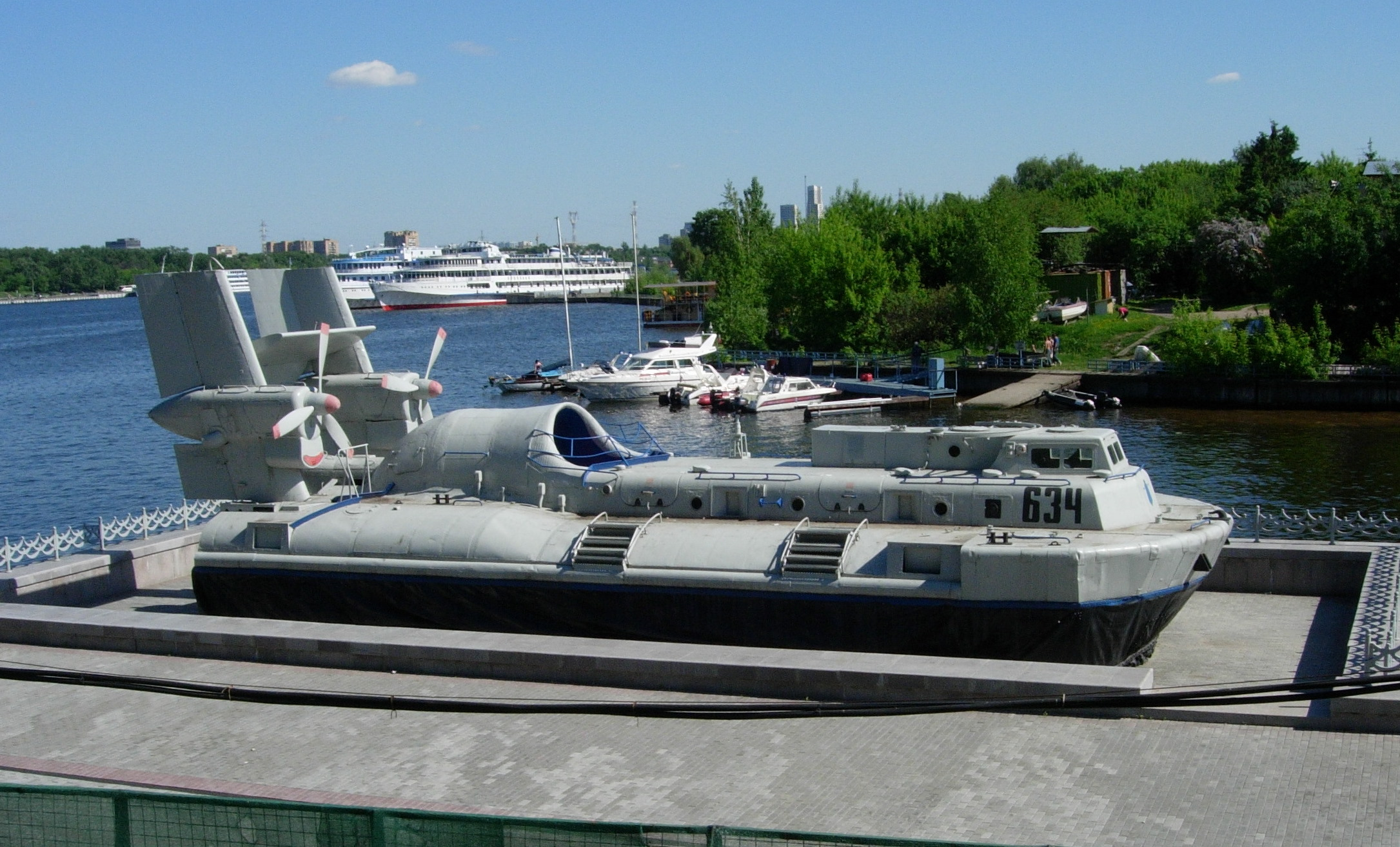 Десантный корабль на воздушной подушке 1205 "Скат" в филиале музея ВМФ РФ